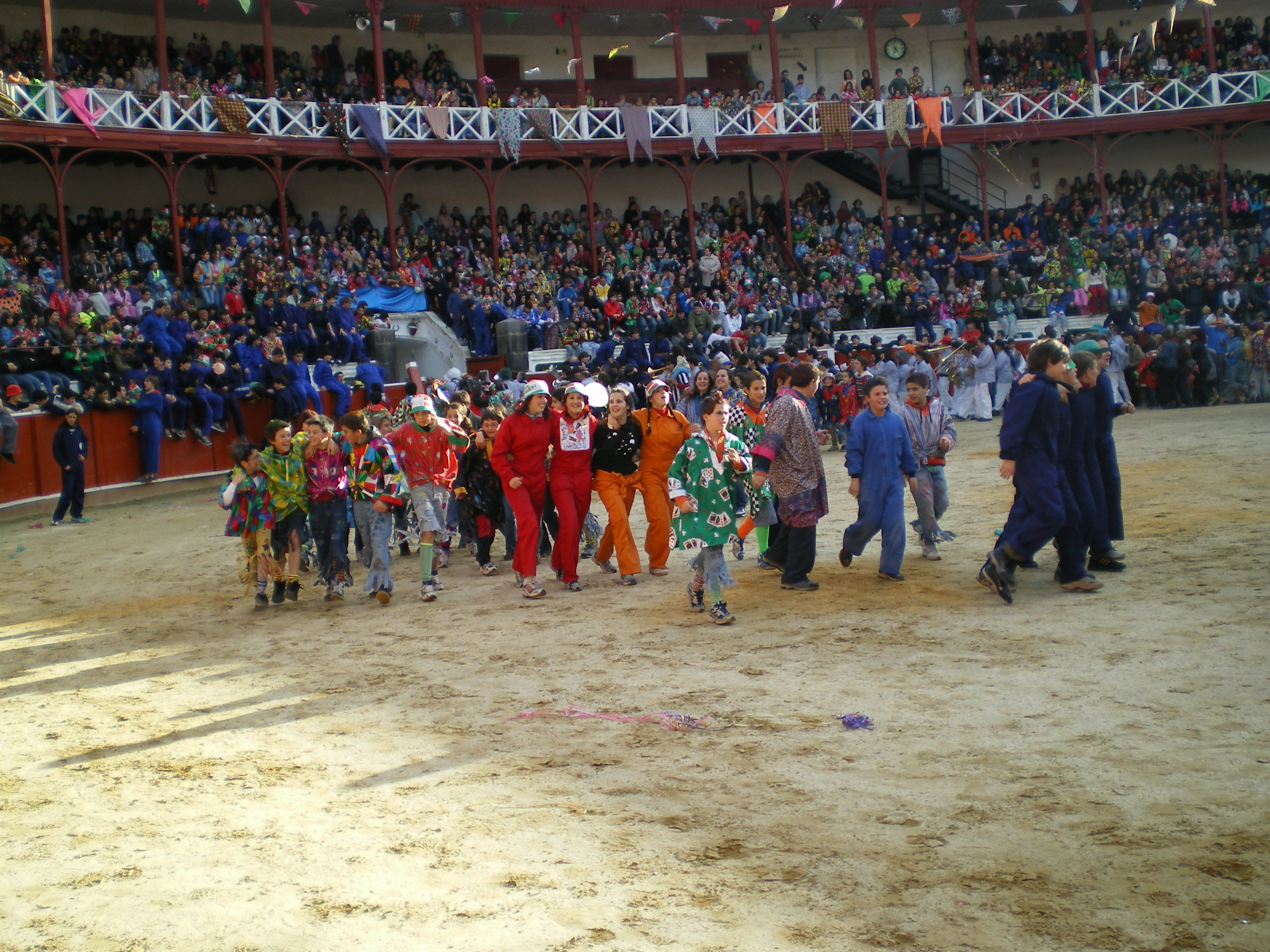 Tolosako zezen plazan ateratako argazkia